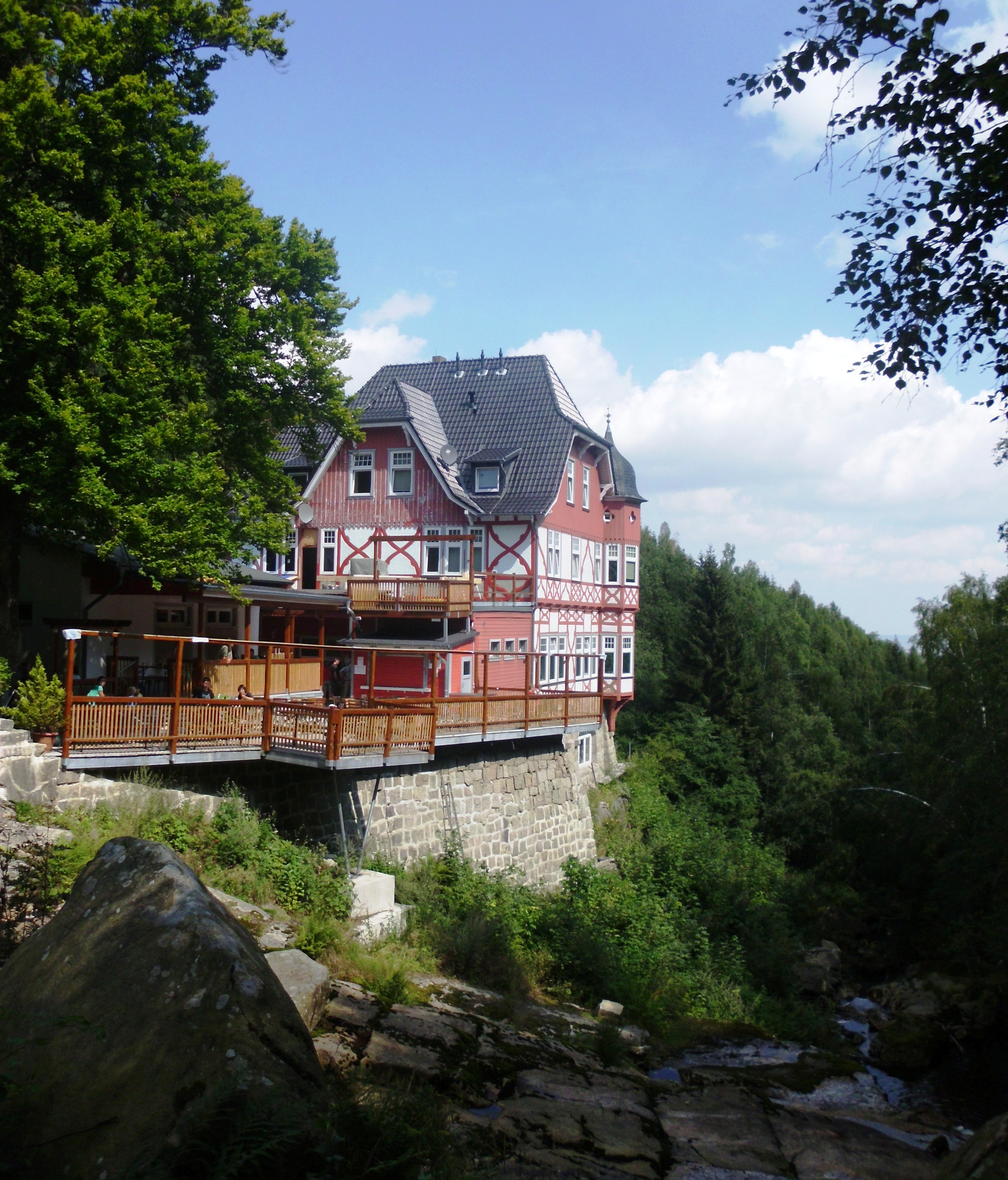 Gasthaus mit Wasserfall Steinerne Renne an der Holtemme bei Wernigerode